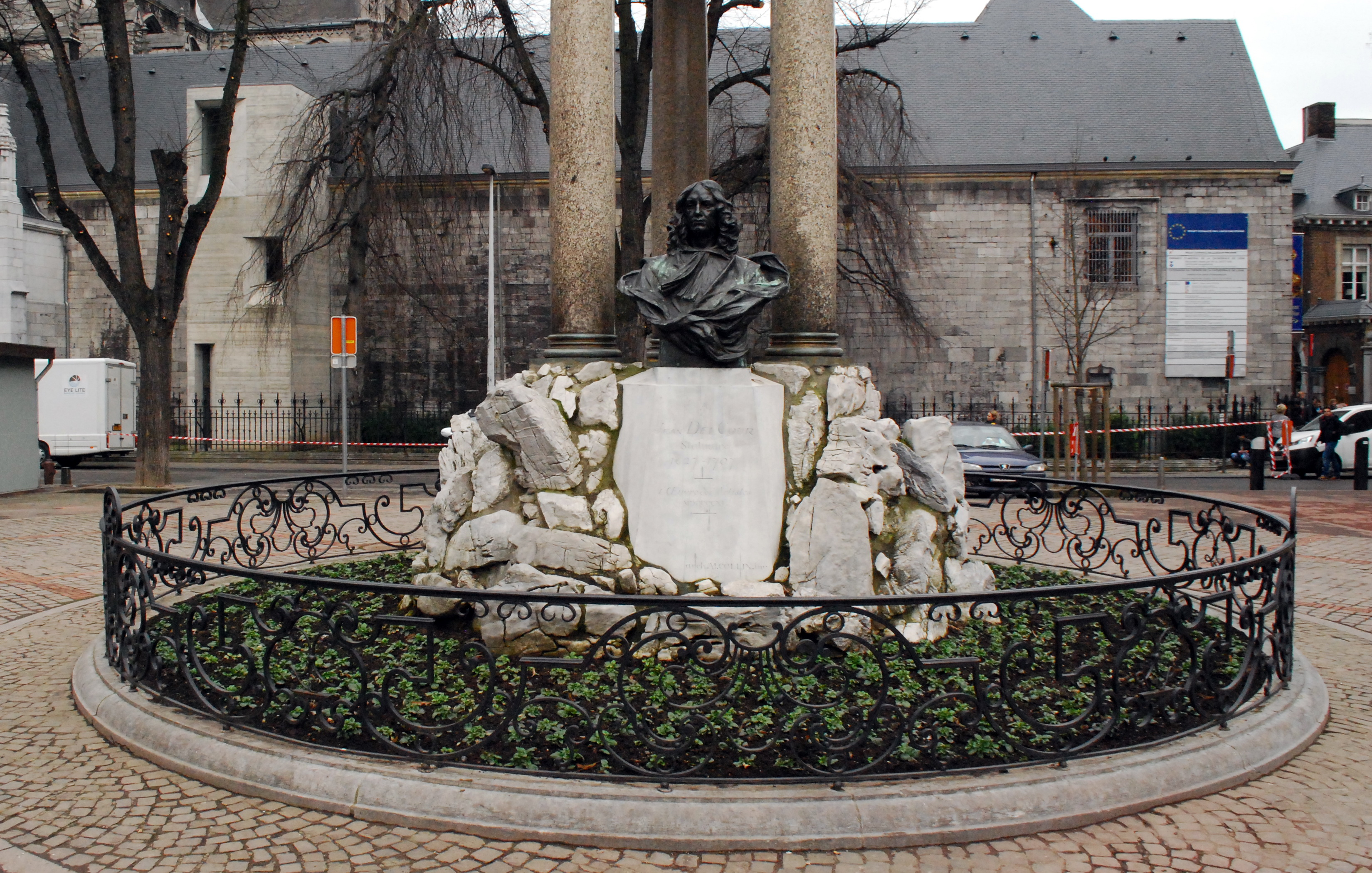 Vue de la place Saint-Paul à Liège.